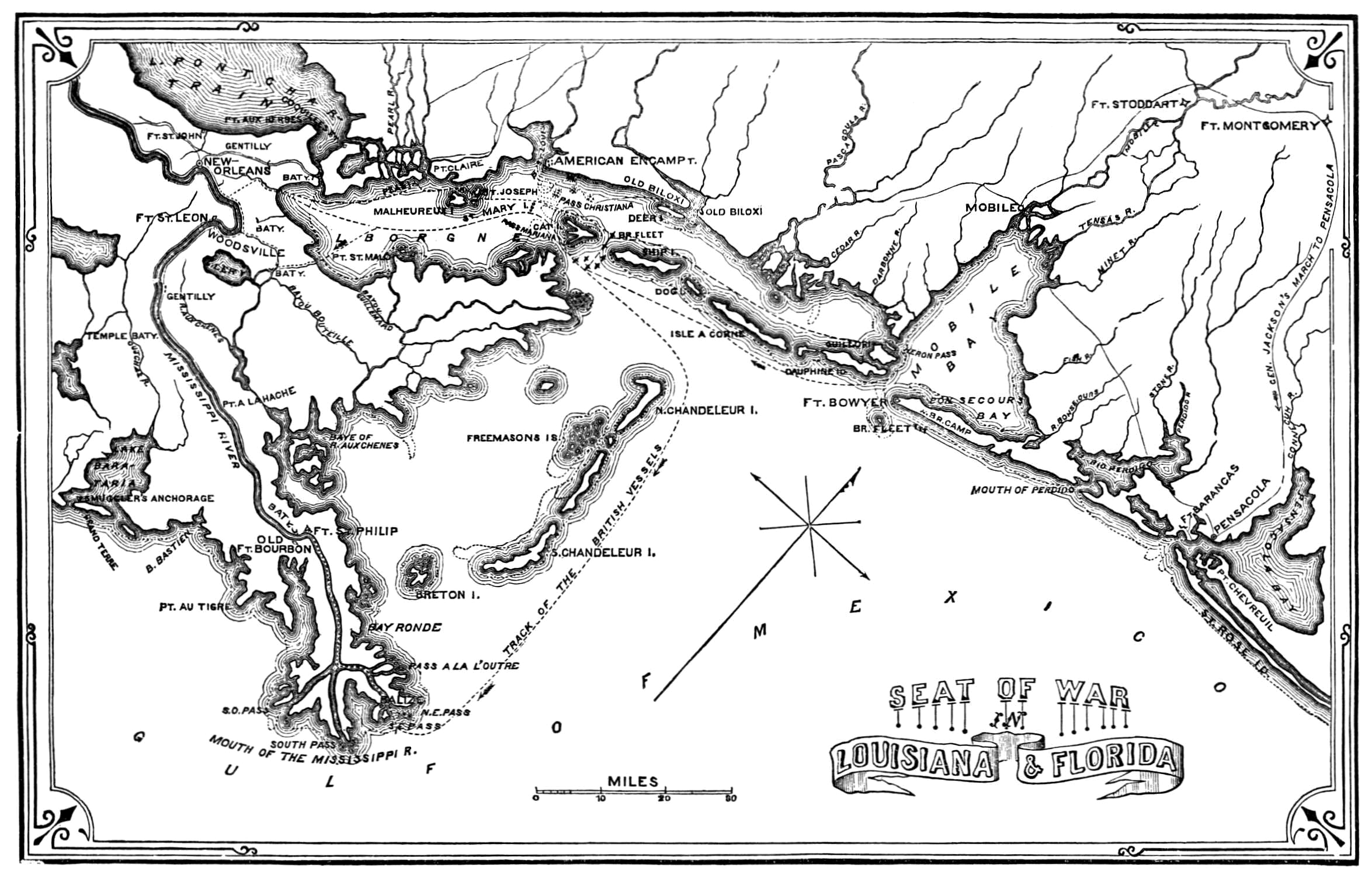 Carte récapitulative des événement militaires de 1814 en Floride et Louisiane lors de la seconde guerre d'indépendance